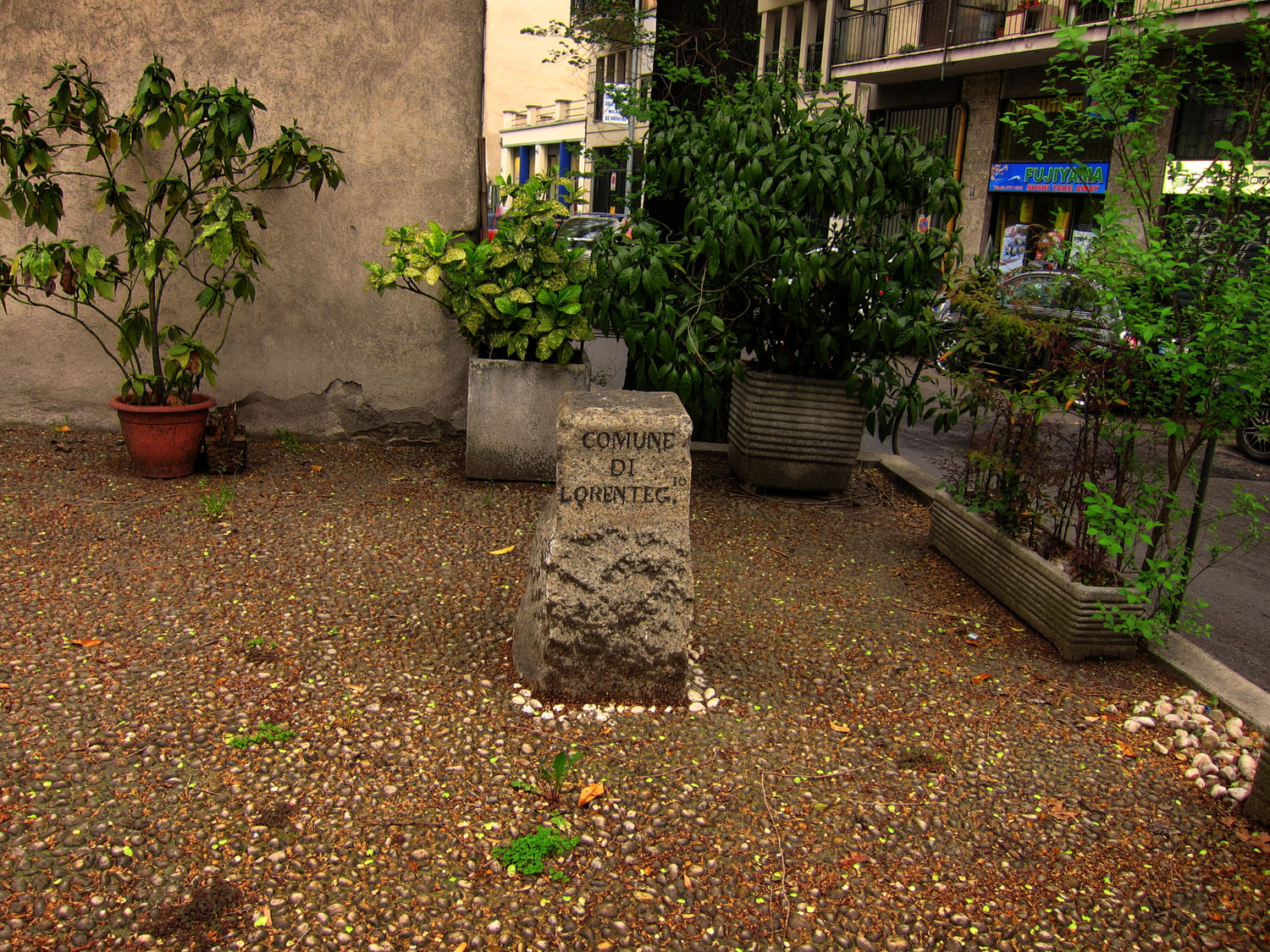 Cippo stradale indicante il territorio dell'antico Comune di Lorenteggio ed Uniti, risalente all'inizio del XIX sec., posto presso l'Oratorio di San Protaso a Milano